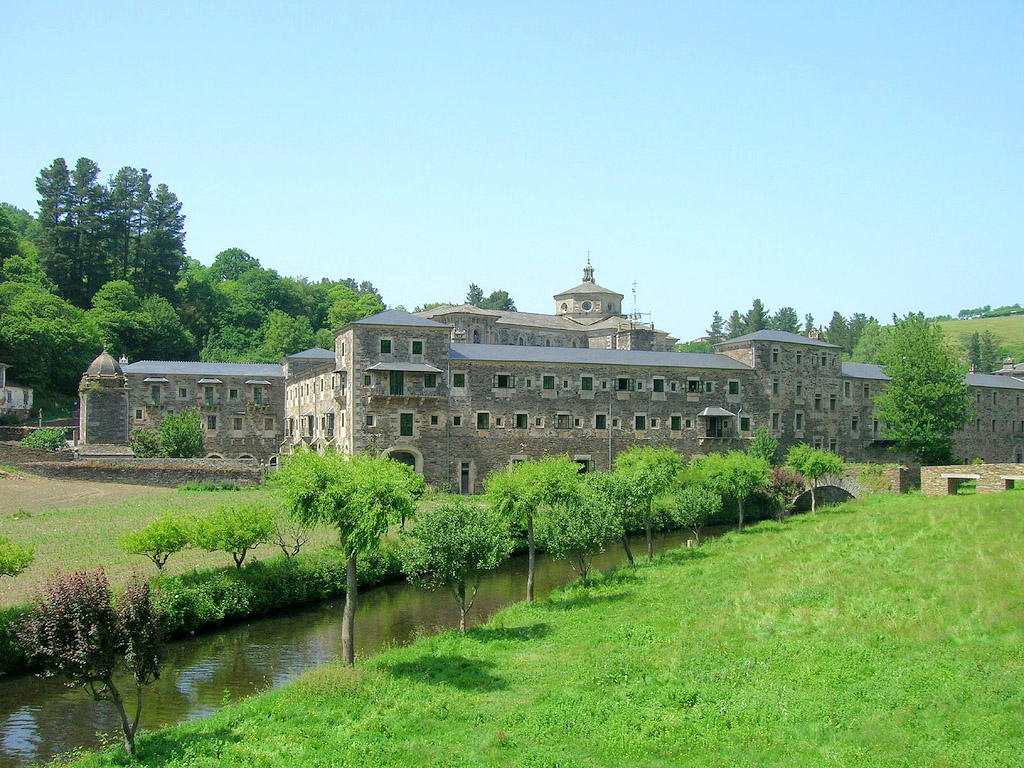 Mosteiro de San Xulián de Samos, Galiza'Mosteiro de San Xulián de Samos'